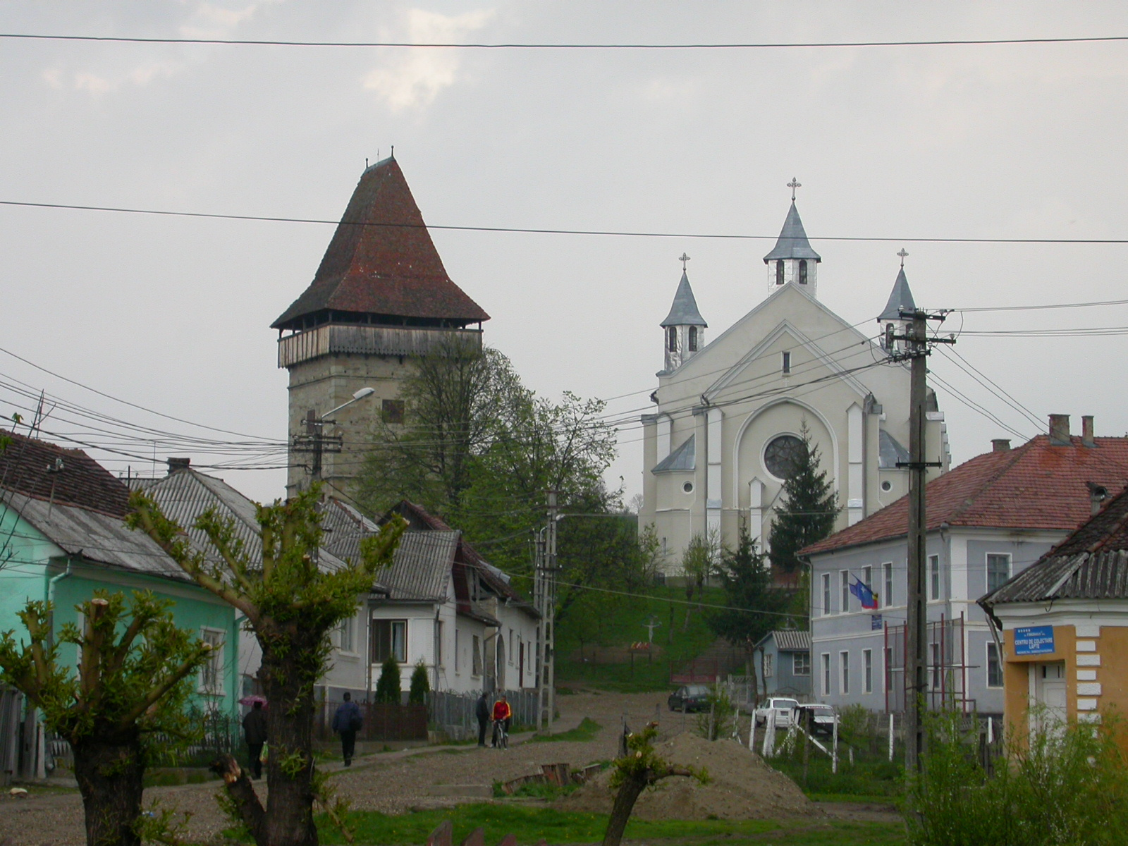 Ansamblul bisericii evanghelice C.A., azi ansamblul bisericii ortodoxe "Sf. Ap. Petru și Pavel" sec. XV - XIX